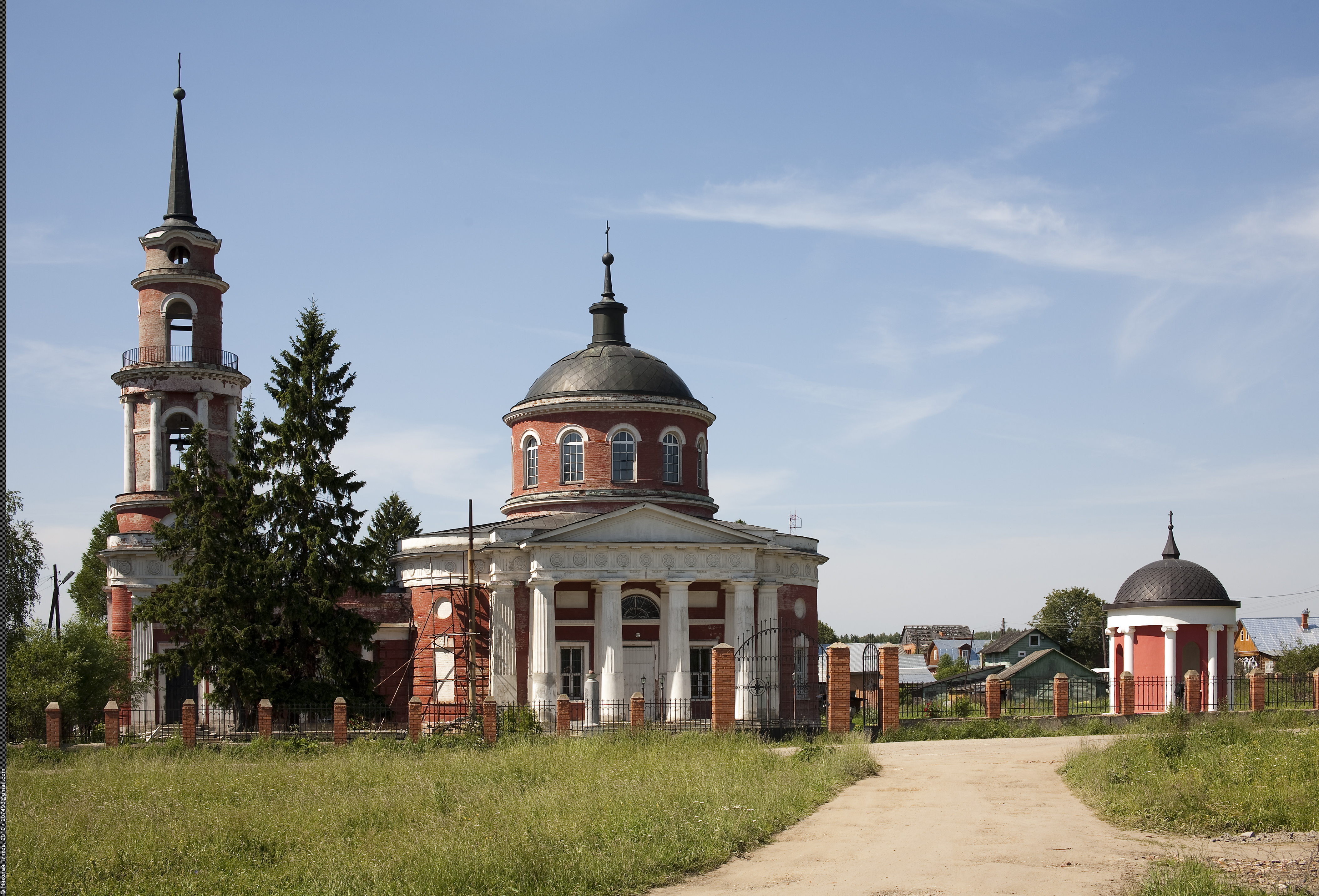 Каменная однокупольная церковь с апсидальными алтарём и притвором, переходом соединённая с колокольней. Хороший образец московского ампира, выстроена в 1821—1825 годы на средства помещика князя И. Н. Трубецкого. Закрыта в конце 1930-х годов. Возвращена верующим в 1991 году в тяжёлом состоянии, отреставрирована.